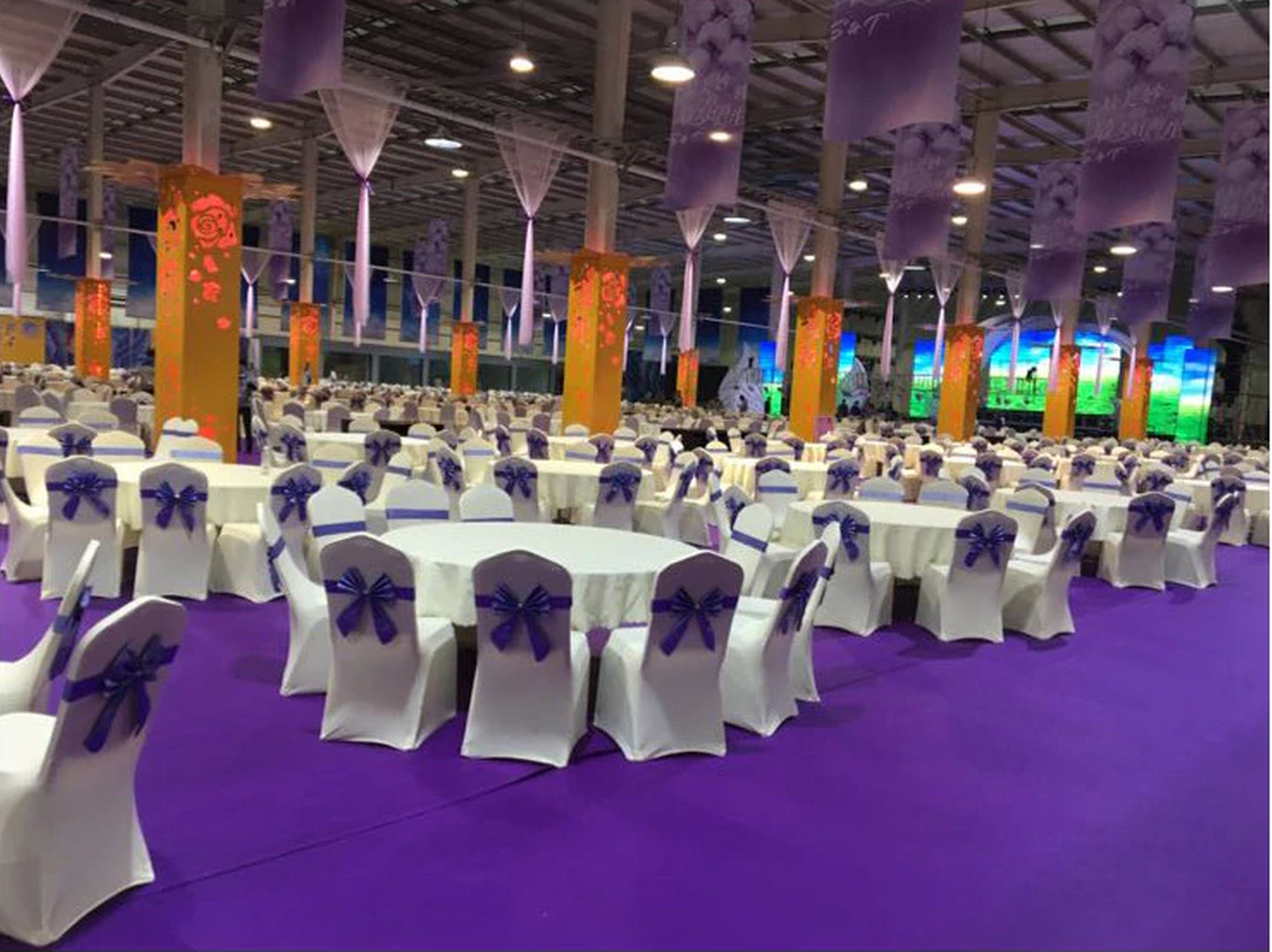 Stuhlhussen